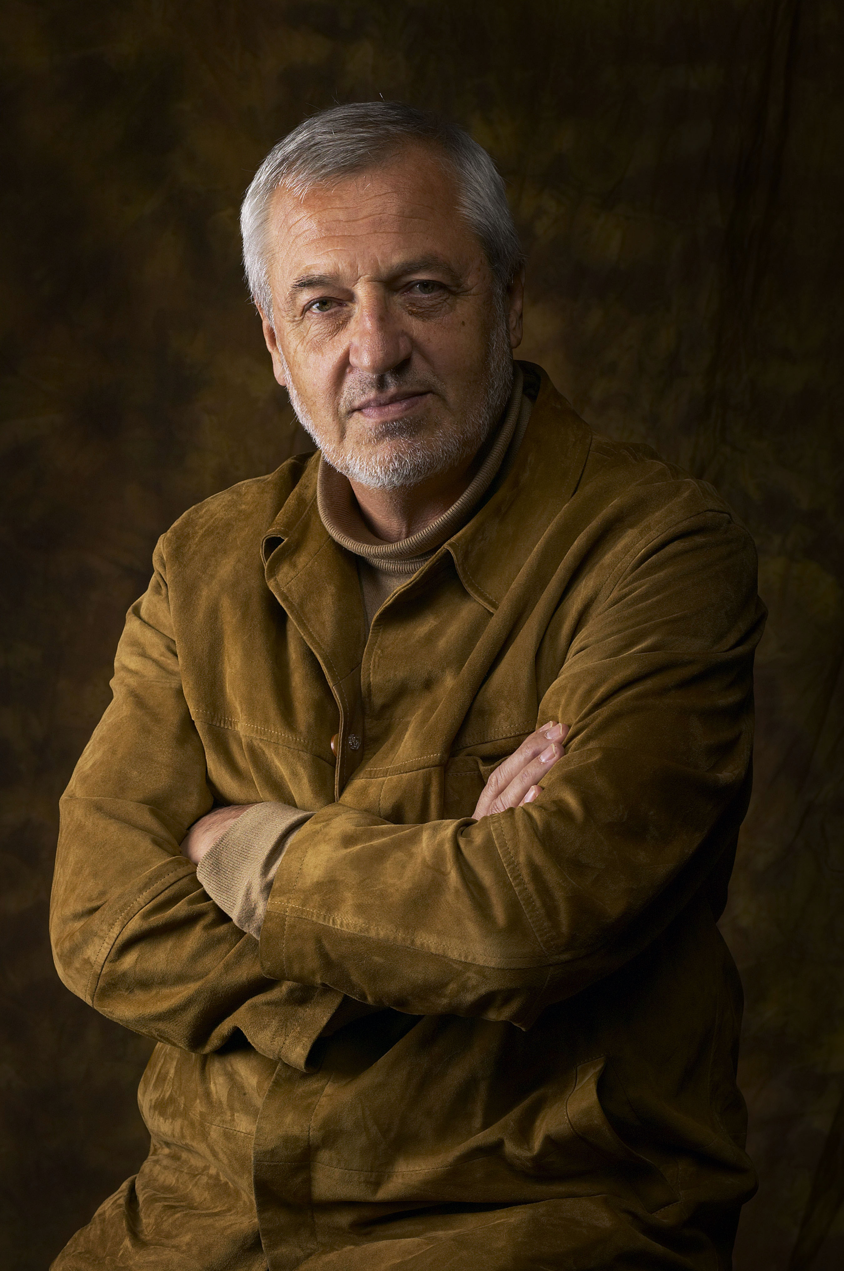 български писател